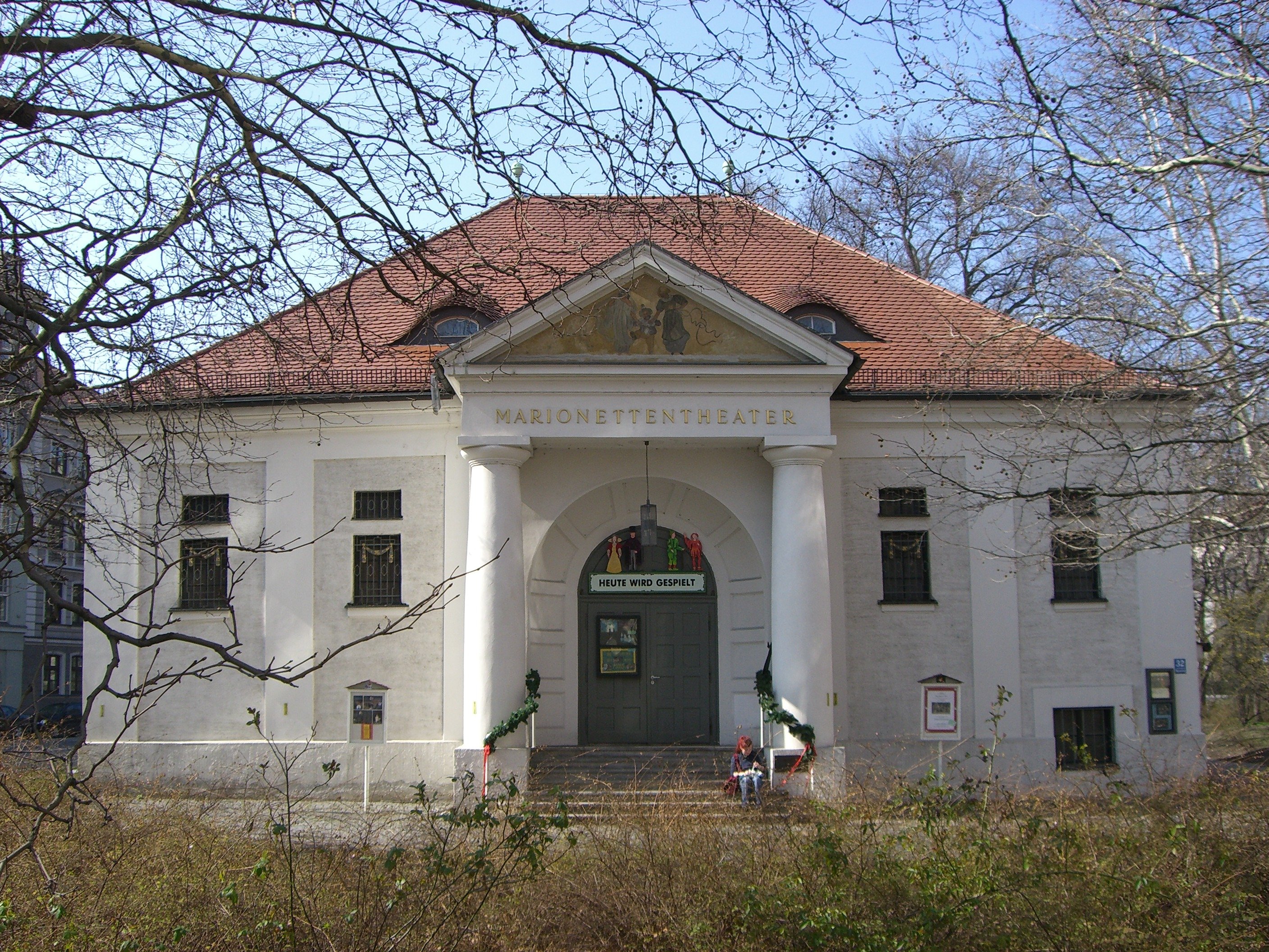 Münchner Marionettentheater (2007)